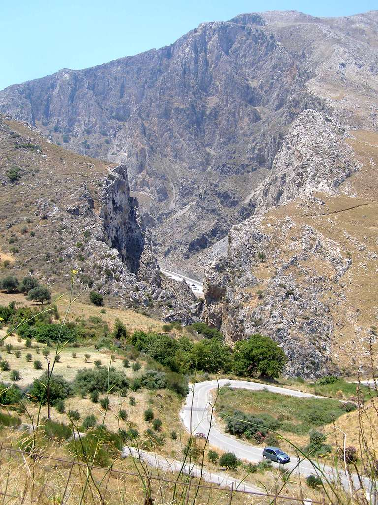 Eingang der Kourtaliotiko-Schlucht, Kreta